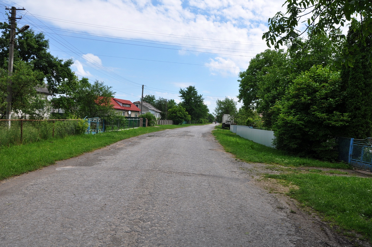 Село Пастуше Чортківського району Тернопільської області України.